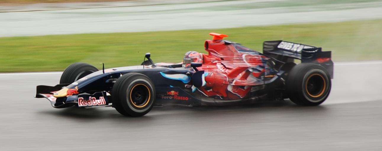 Vitantonio Liuzzi testing for Scuderia Toro Rosso at the Circuit de Catalunya, May 2007.